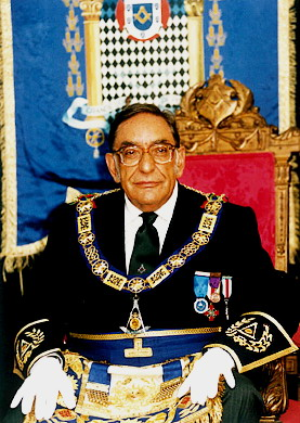 Fernando Teixeira - Grão Mestre e Fundador da Grande Loja Regular de Portugal. Autor: Carlos Botelho do acervo Fotográfico da GLRP.